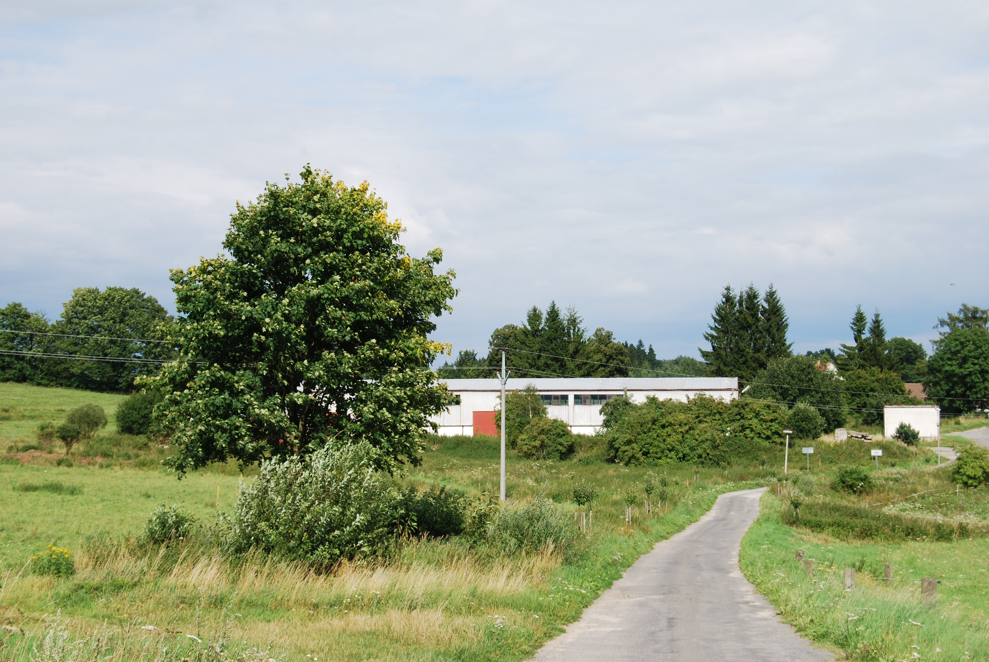 Pohled na obec od příjezdové komunikace. Hubov je část obce Nadějkov v okrese Tábor.